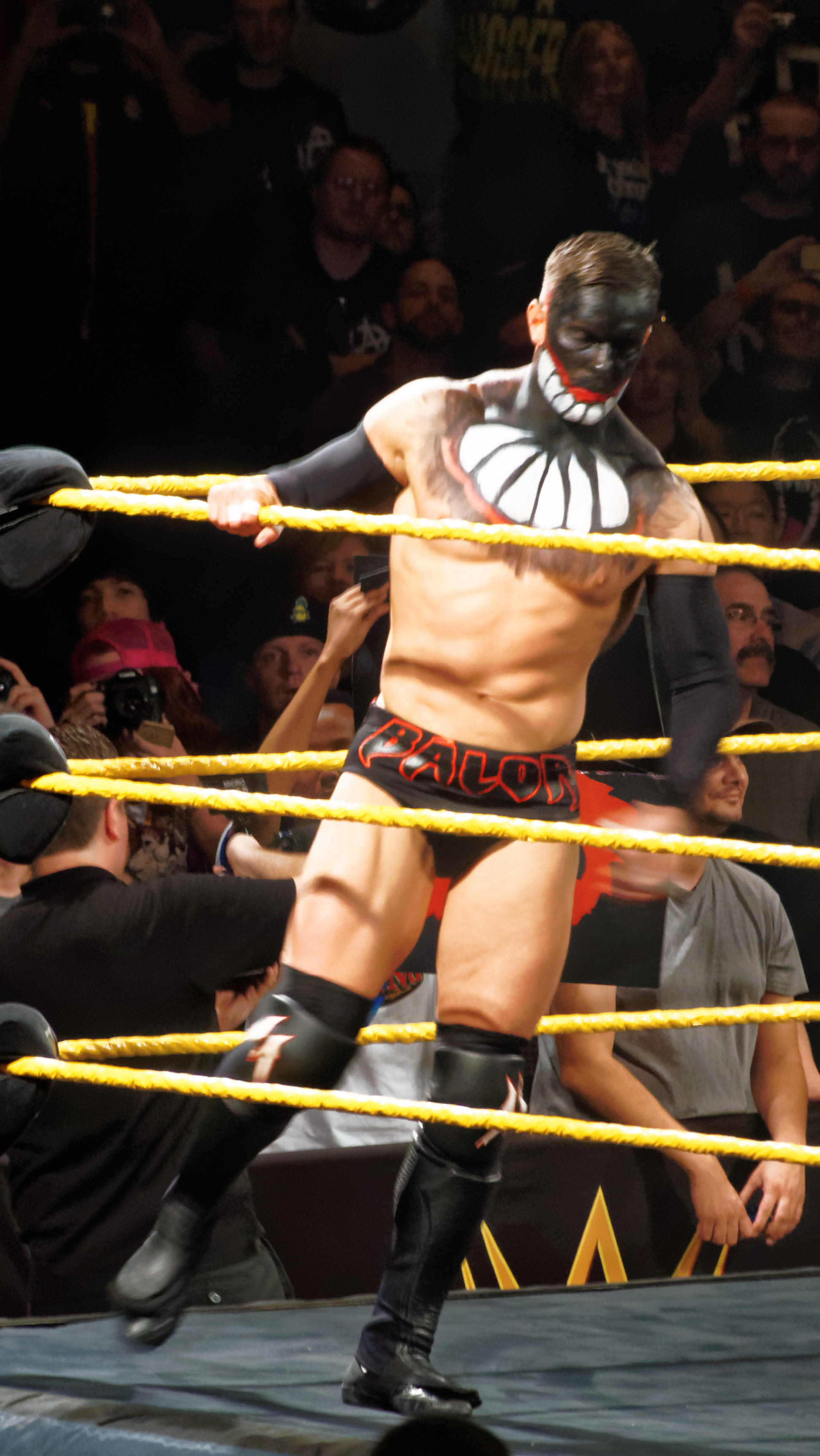 2015-03-28_00-48-01_ILCE-6000_4087_DxO